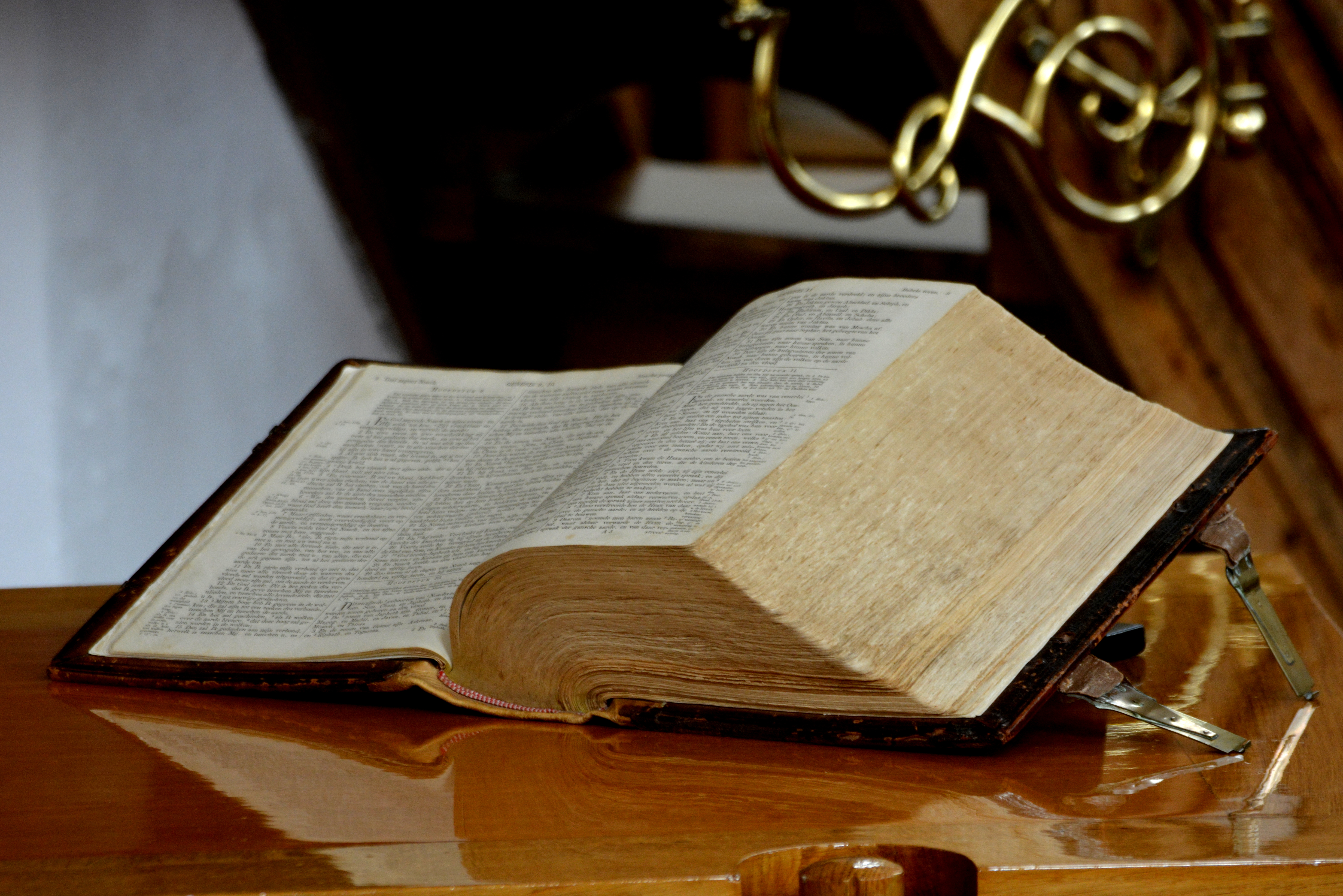 Hasselt, Stefanuskerk, Bijbel